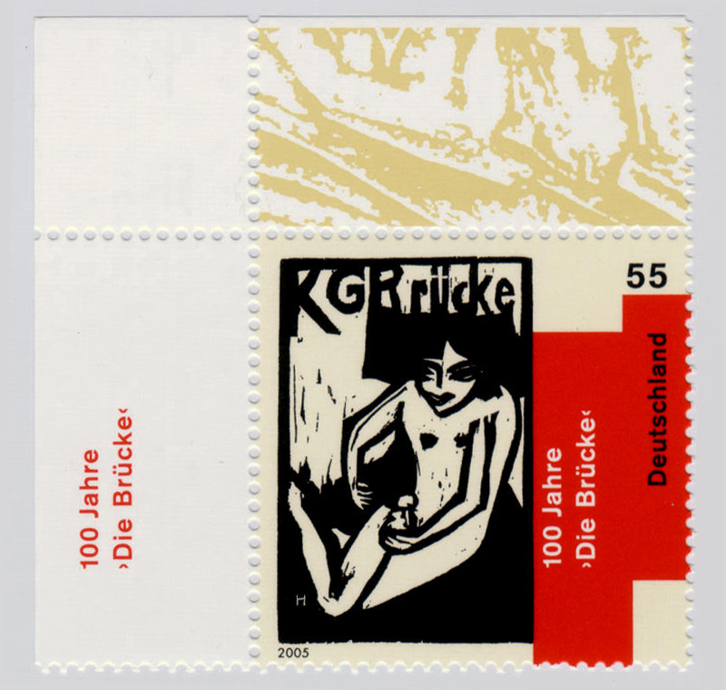 »100 Jahre KG Brücke«, Ausgabetag: 12. Mai 2005